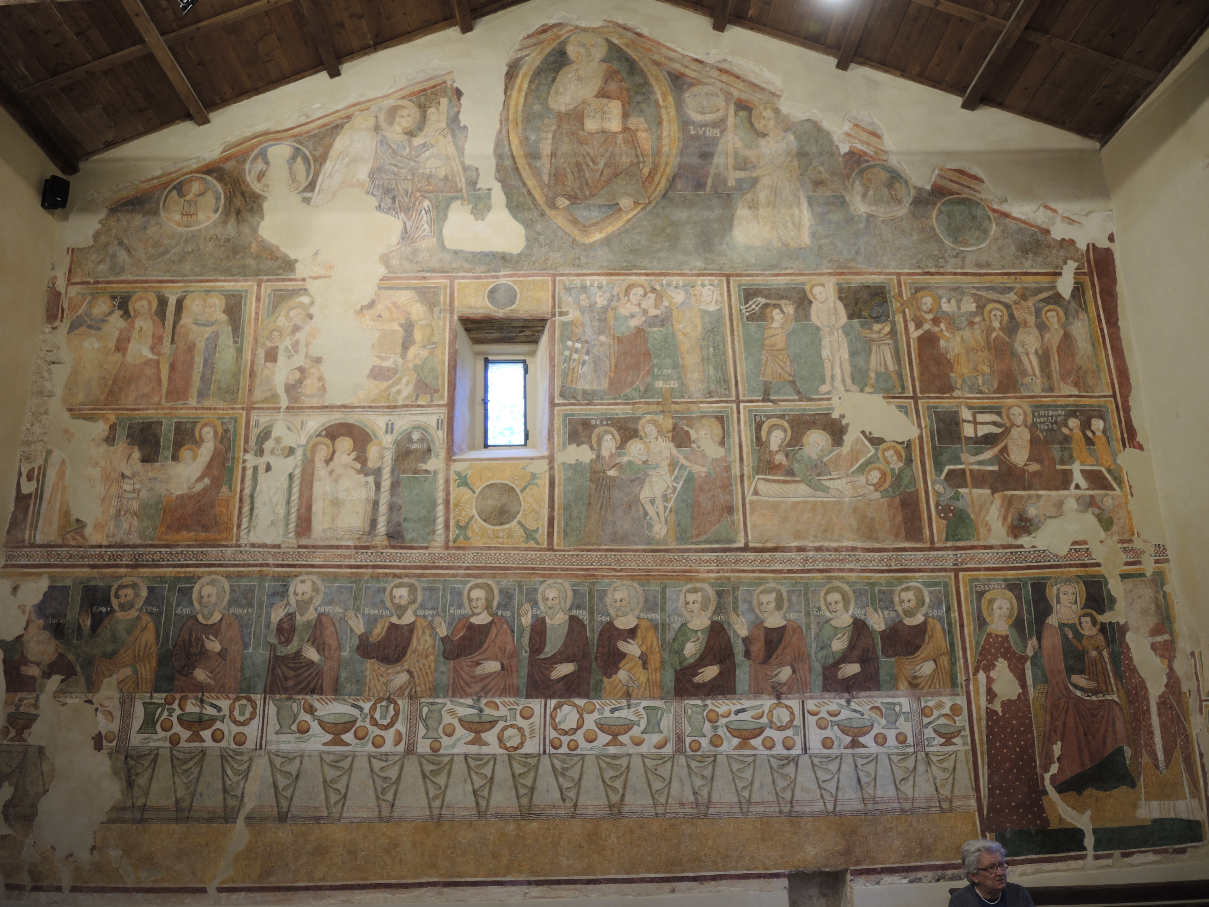 Rocca di Cambio (AQ): Abbazia di Santa Lucia